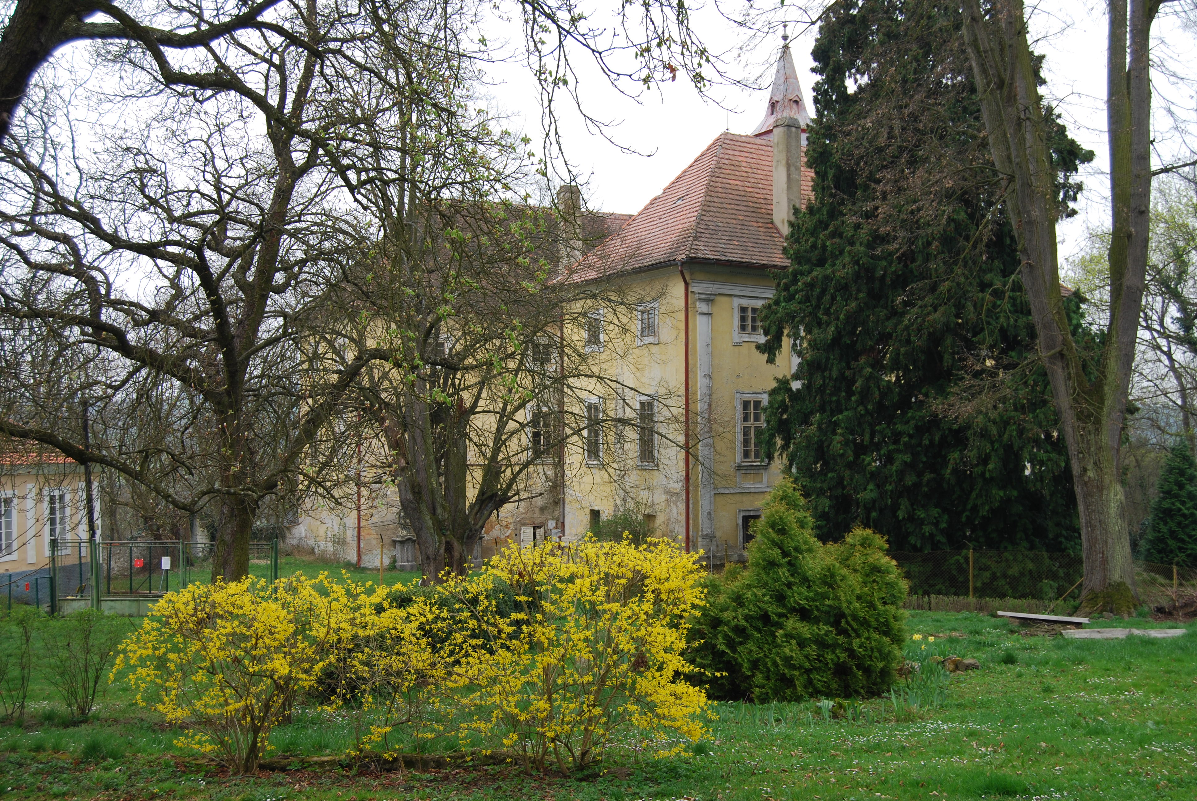 Zámek Osečany. Obec Osečany v okrese Příbram, kraj Středočeský, Česká republika.